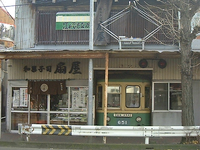 「扇屋」の店頭に保存された、江ノ電もなかのモデルとなった江ノ島電鉄600形電車の前面